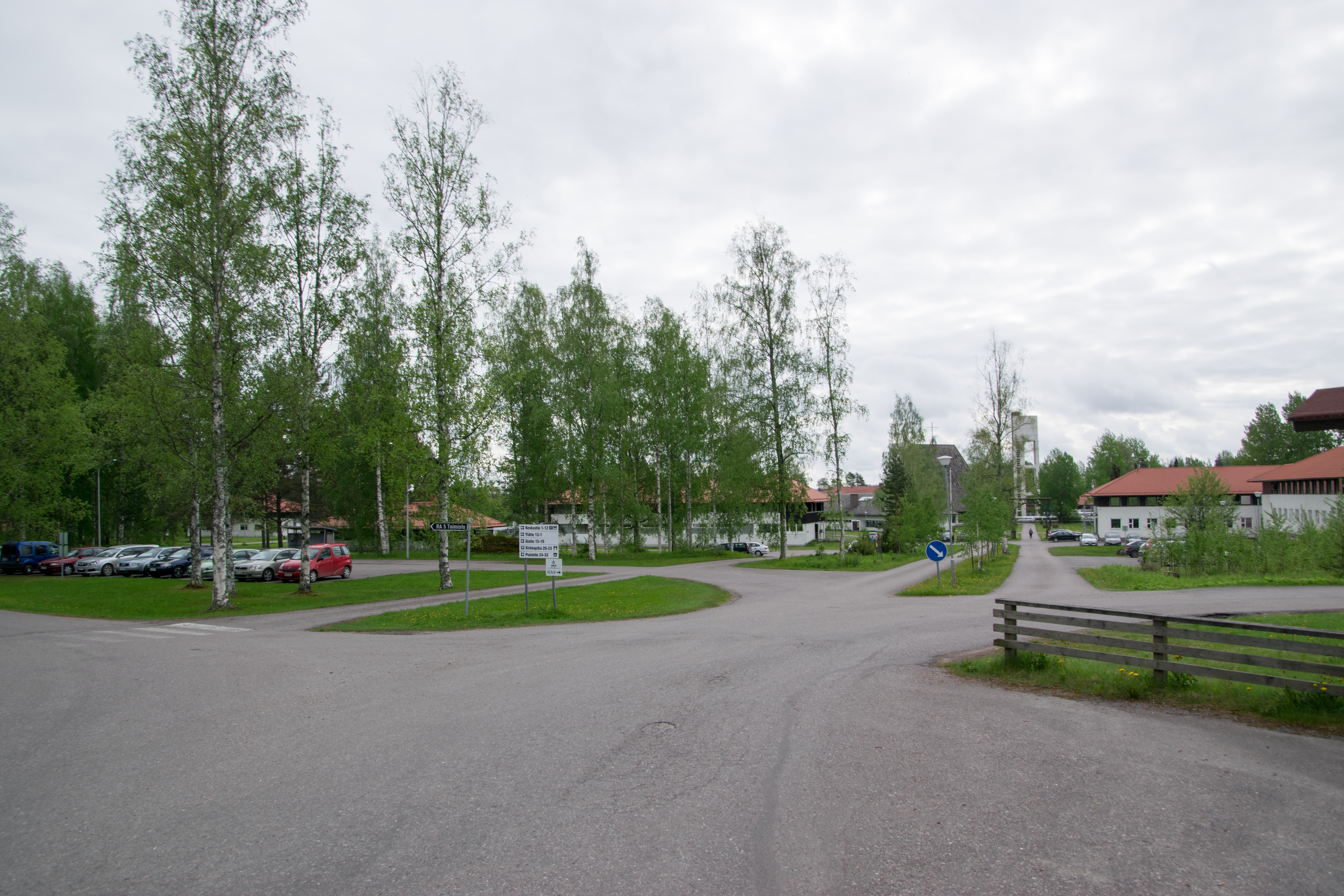 Vaalijalan laitos Pieksämäellä